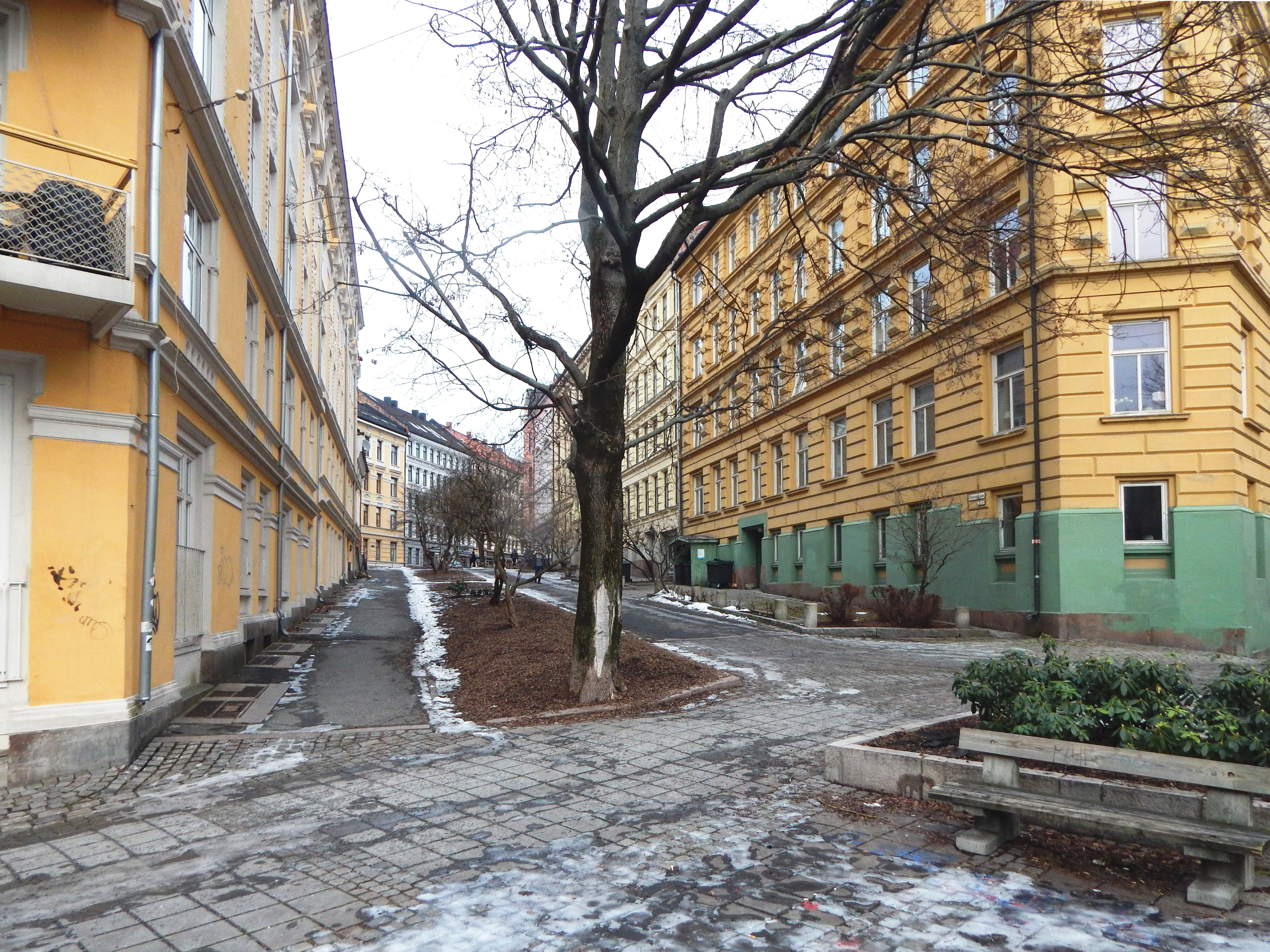 Øvre del av Glückstads gate